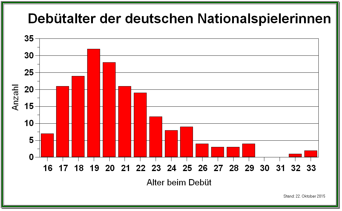 Altersverteilung der deutschen Fußballnationalspielerinnen beim Debut, Stand 17.2.2010